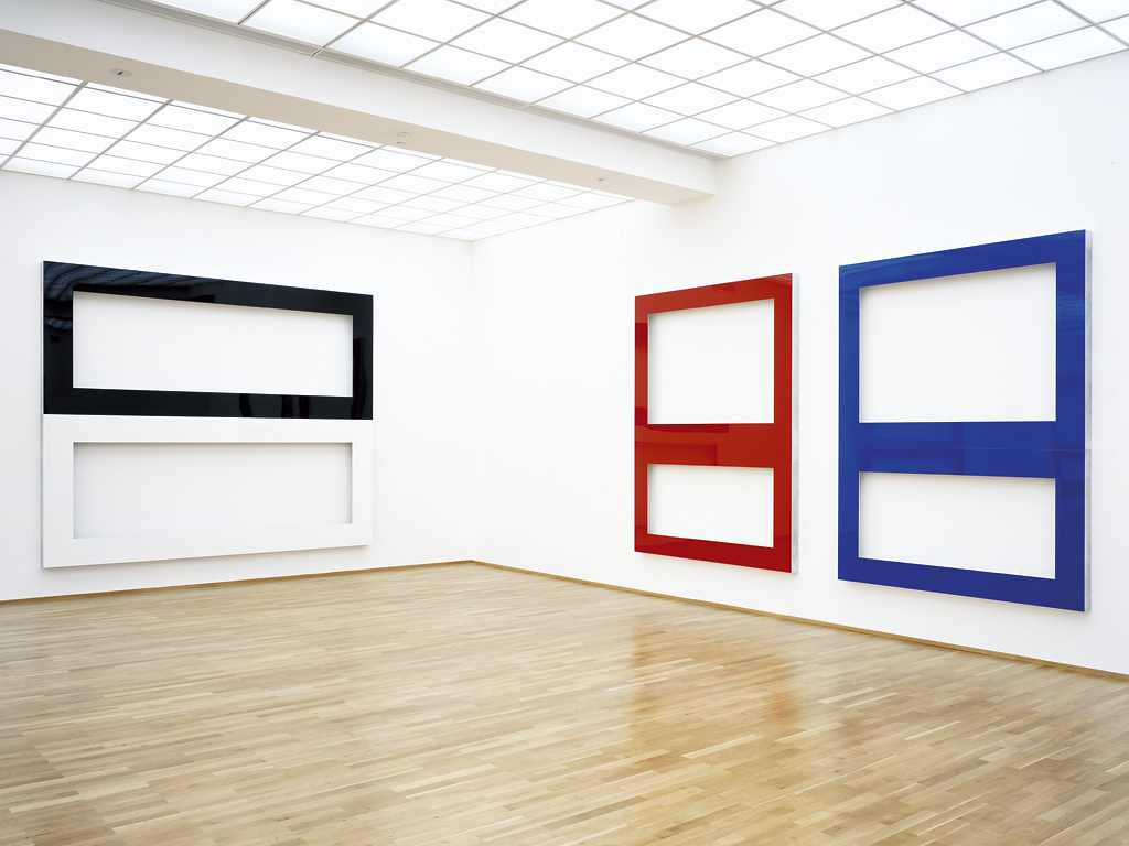 Installationsansicht „get ready“, Nationalgalerie im Hamburger Bahnhof. Museum für Gegenwart, Berlin 2002.